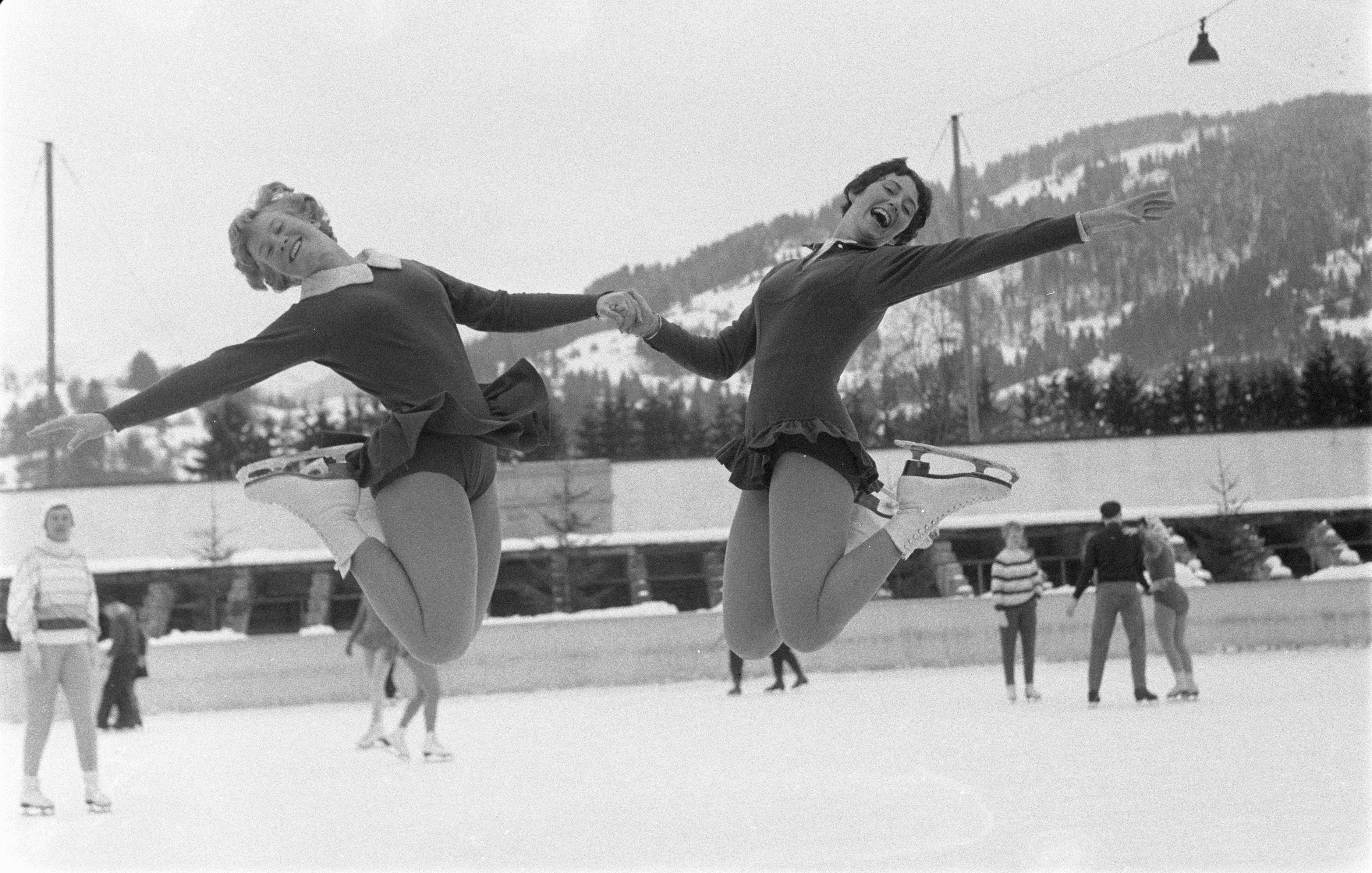 Collectie / Archief : Fotocollectie Anefo Reportage / Serie : [ onbekend ] Beschrijving : Europese schaatskampioenschap schoonrijden te Garmisch, Sjoukje Dijkstra en Joan Haanappel Datum : 3 februari 1960 Locatie : Duitsland, Garmisch Trefwoorden : kampioenschappen, kunstrijden, schaatsen Persoonsnaam : Dijkstra, Sjoukje, Haanappel, Joan Fotograaf : Pot, Harry / Anefo Auteursrechthebbende : Nationaal Archief Materiaalsoort : Negatief (zwart/wit) Nummer archiefinventaris : bekijk toegang 2.24.01.05 Bestanddeelnummer : 910-9986